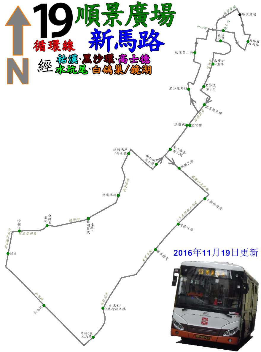 中文（香港）: 澳門巴士19A線的走線圖